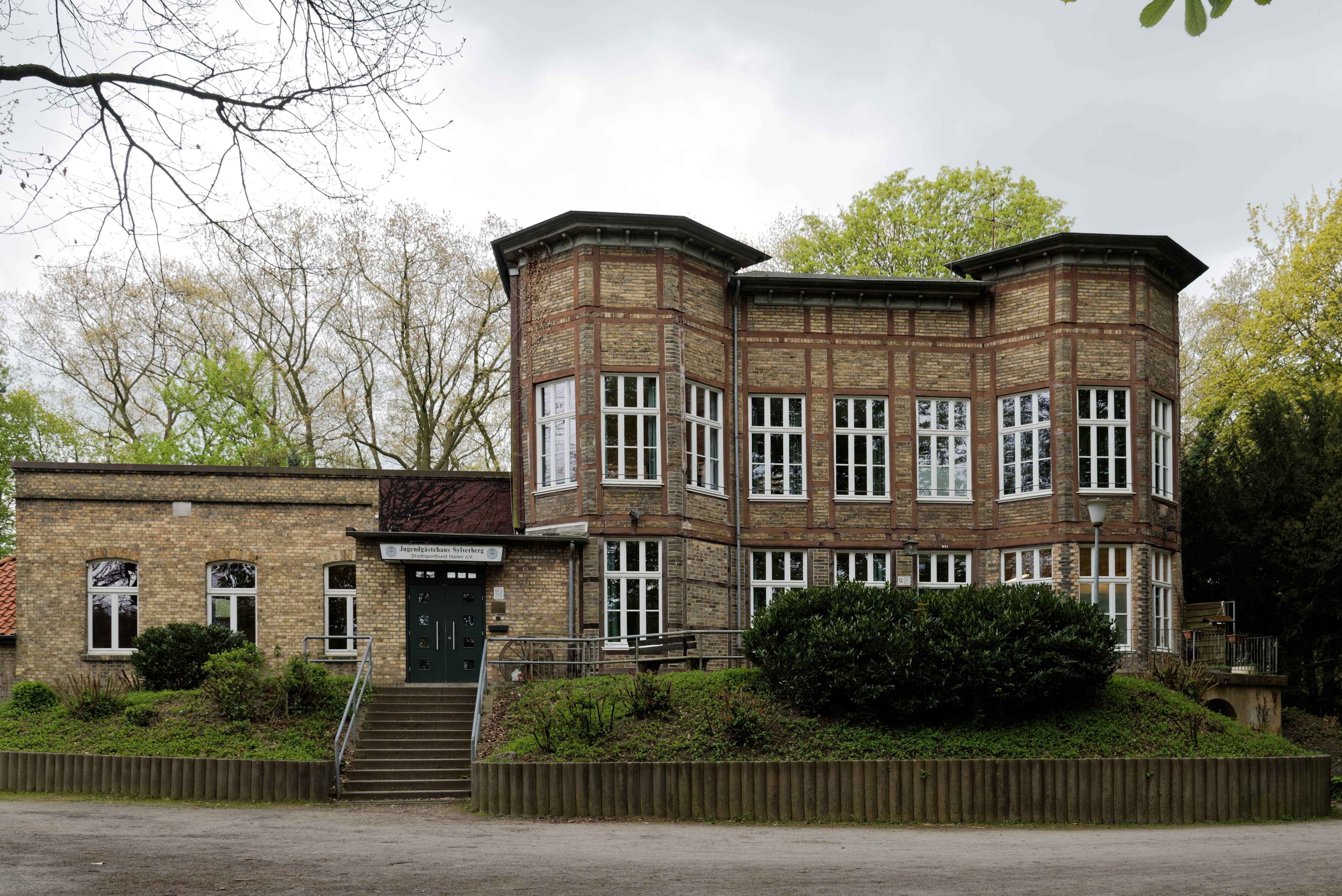 Vorderseite vom Jugendgästehaus Sylverberg in Bad HammThis is a photograph of an architectural monument., no. 181